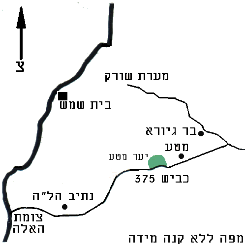 תרשים המראה את מיקום מושב מטע ויער מטע. ערך י.ש. 21:11, 31 מרץ 2006 (UTC)